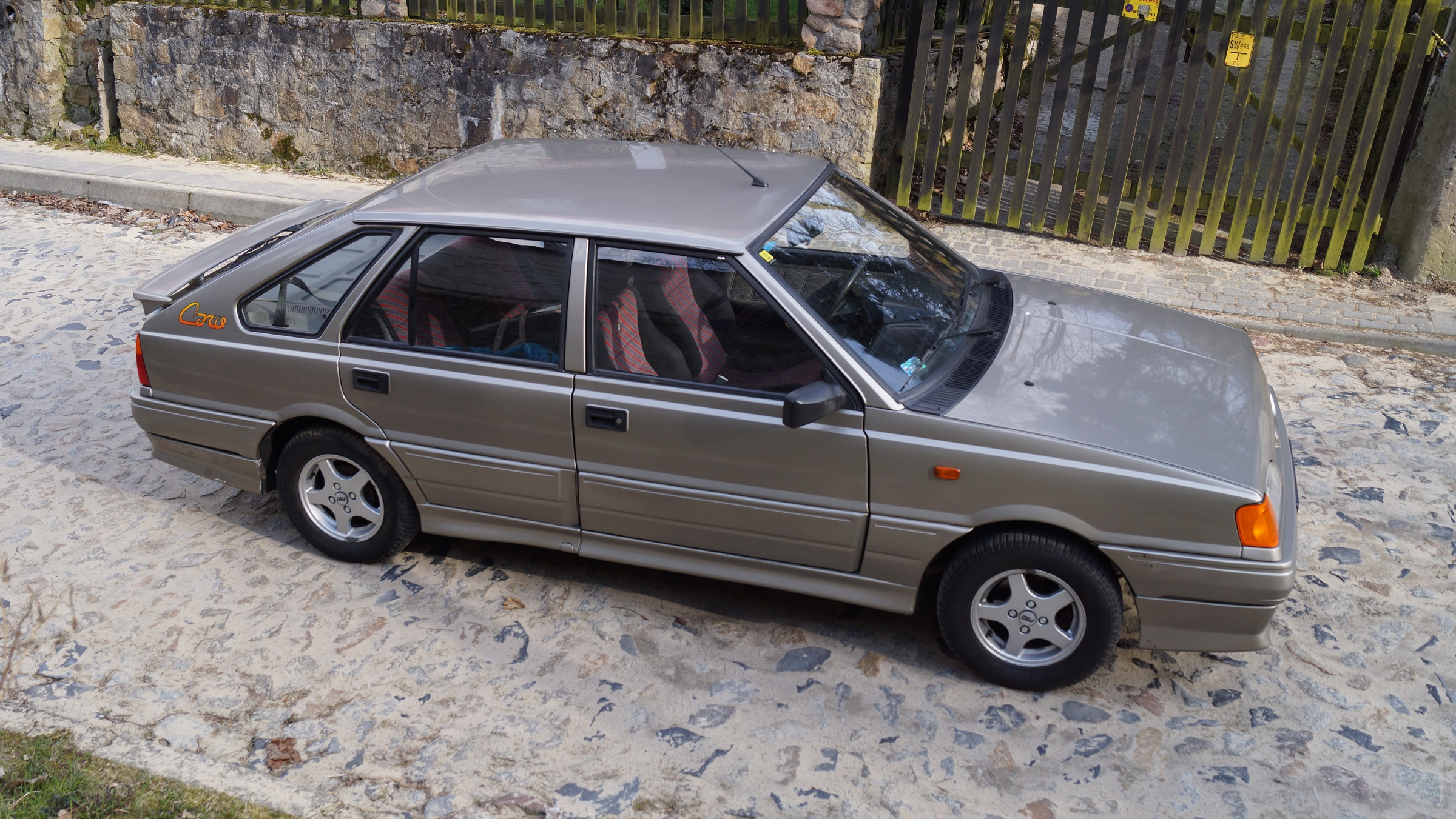 FSO Polonez Caro 1996r